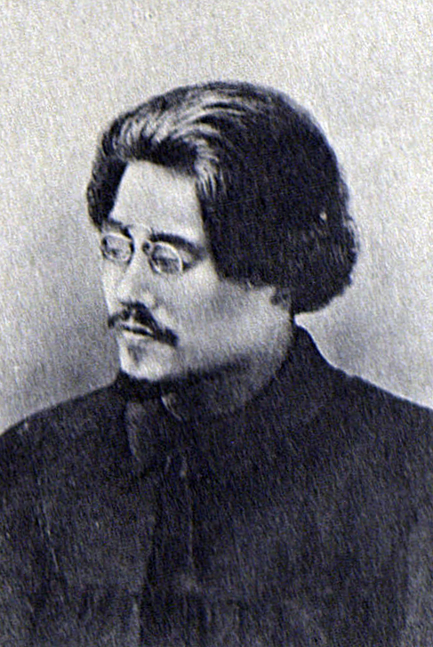 Стуков, Иннокентий Николаевич